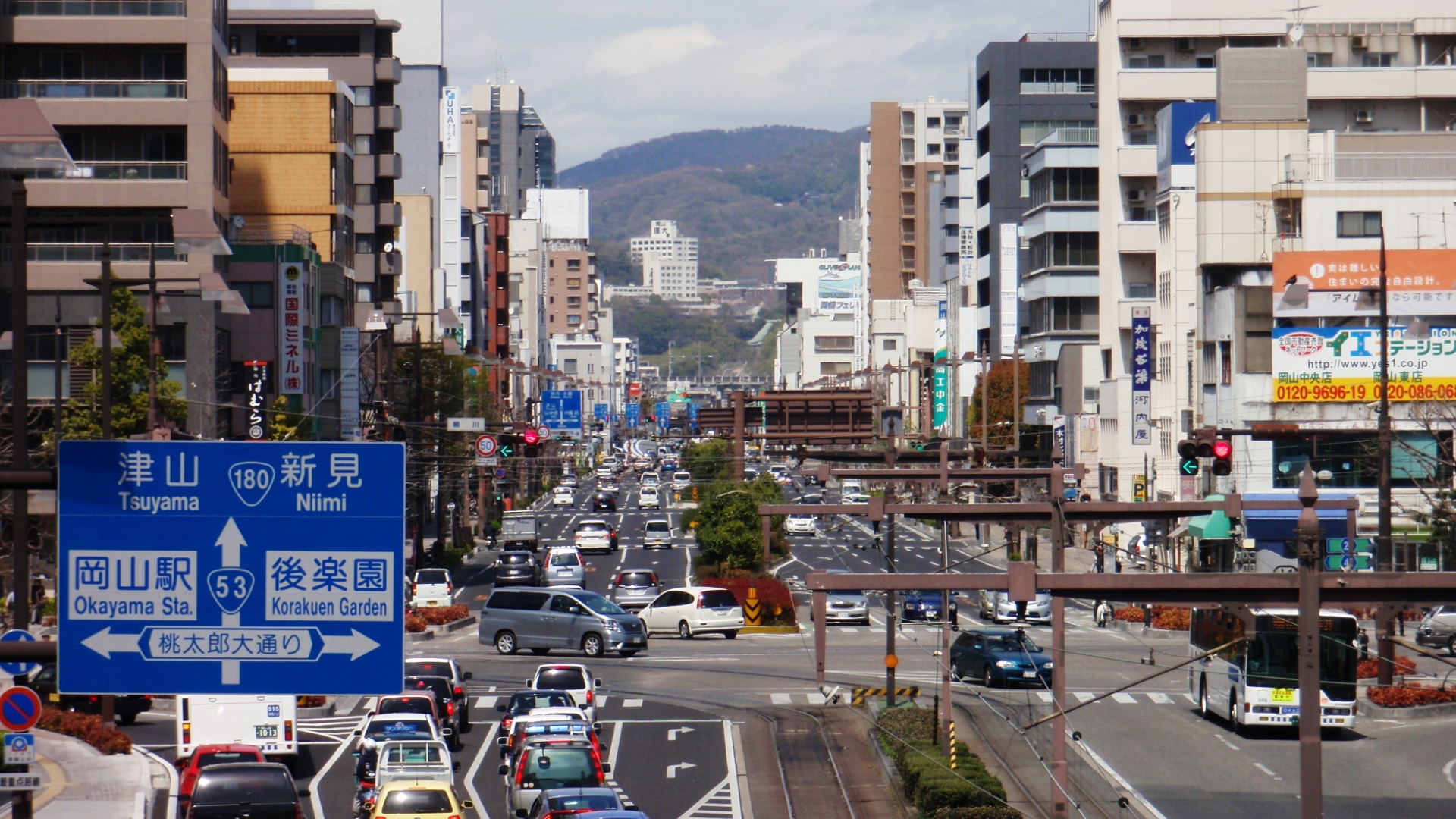 岡山県岡山市北区の国道53号、柳川筋の風景。磨屋町付近から北方向、柳川交差点を見る。